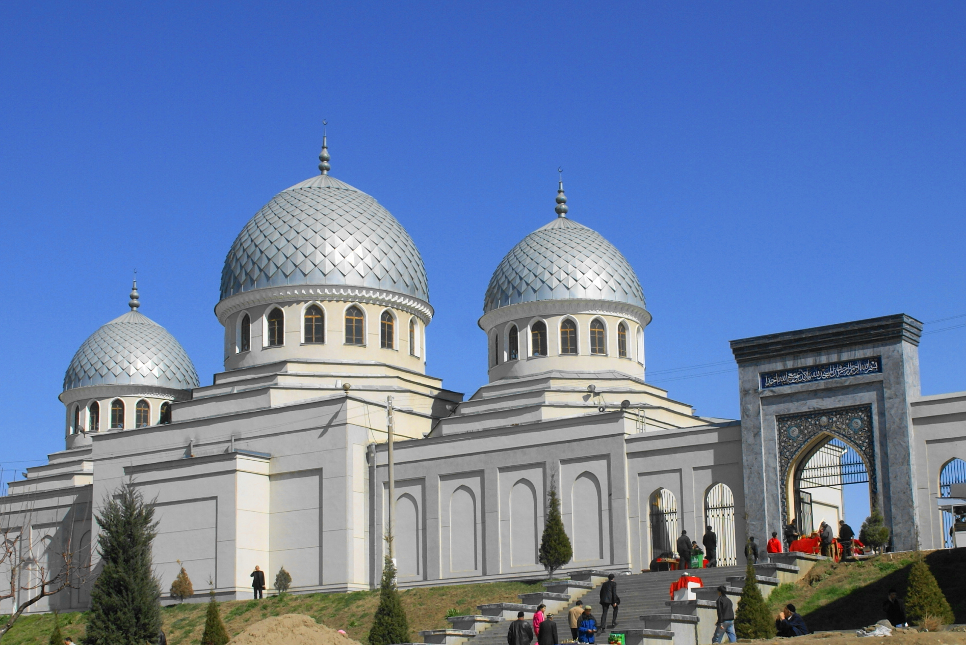 Die Dzhuma-Moschee in Taschkent (Usbekistan) liegt neben der Kukeldash-Medrese und wurde bis 2008 wieder neu gerrichtet